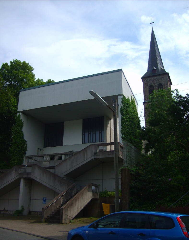 Kirche Sankt Petrus, Langerfeld-Beyenburg, Wuppertal, Germany